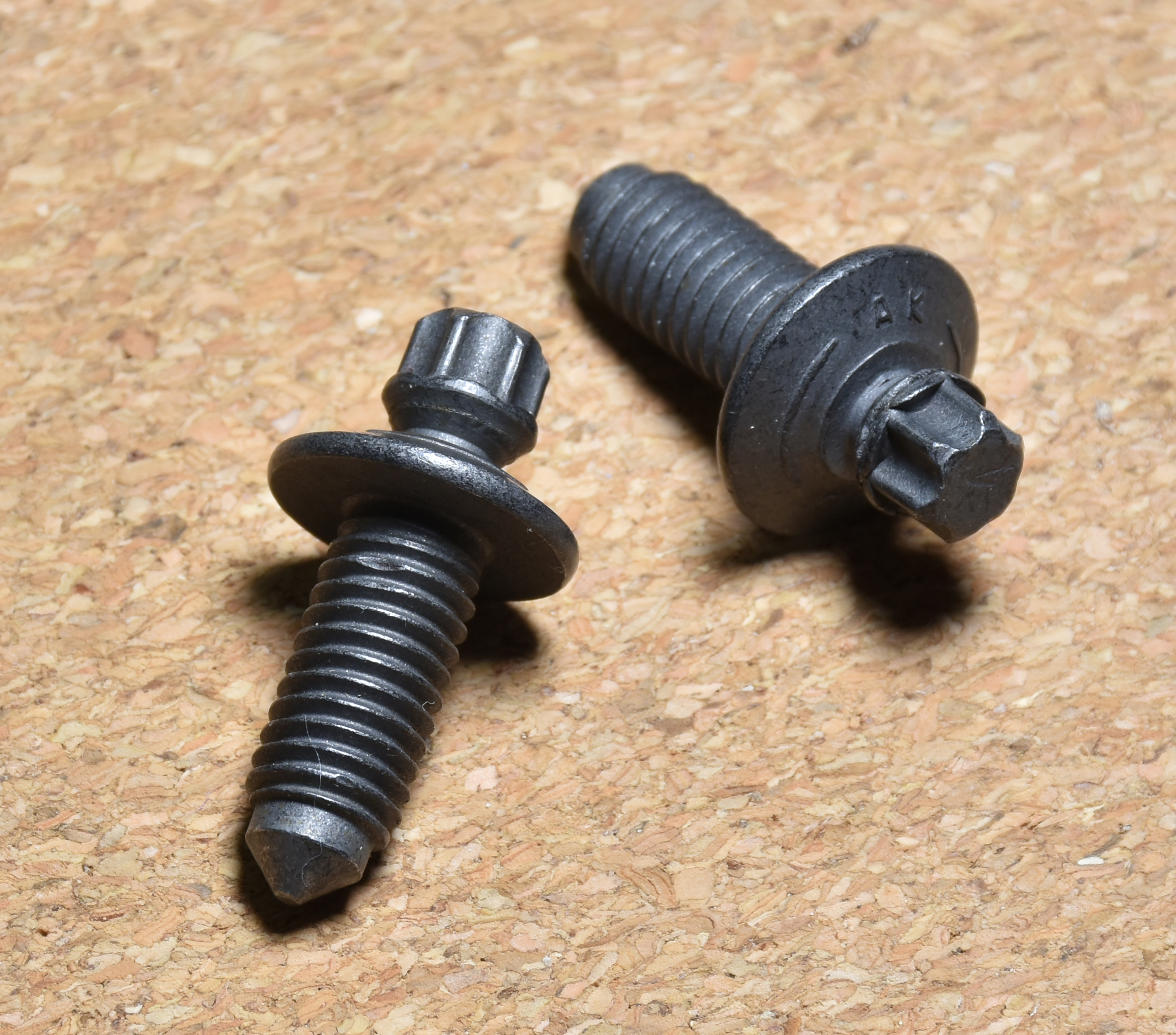 Abreißschrauben N-905-845-02 für ein Lenkschloss